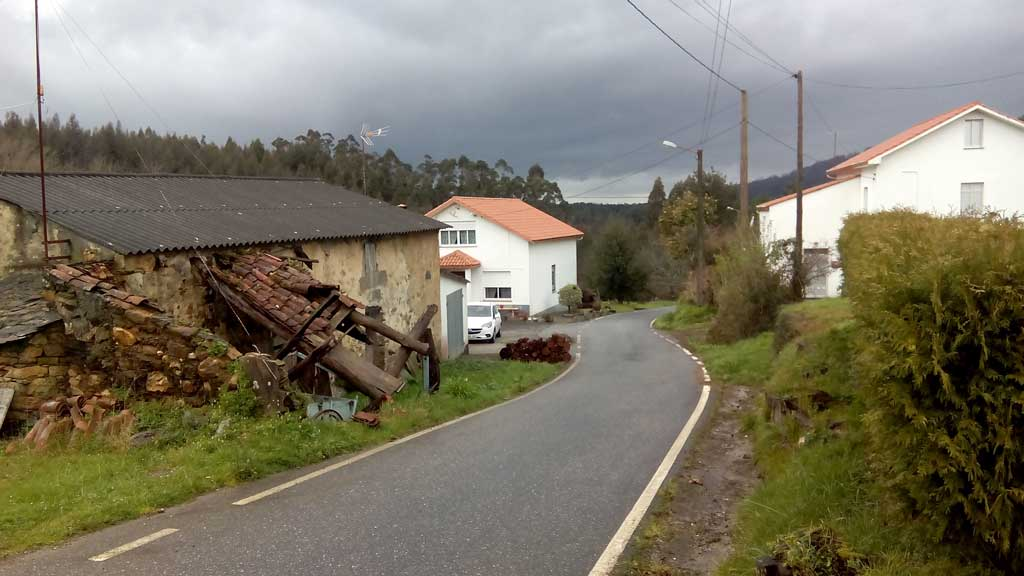 Vista do Verdescal, Doso, Narón.